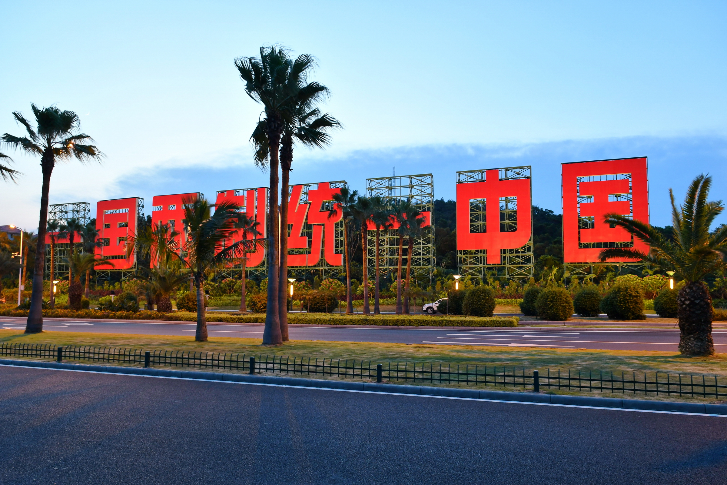 厦门椰风寨环岛路沿岸海滨“一国两制统一中国”宣传牌，建于1999年。